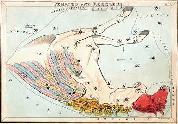 This image was copied from en. The original description was: Pegasus as depicted in Urania’s Mirror, a set of constellation cards published in London c. 1825. {